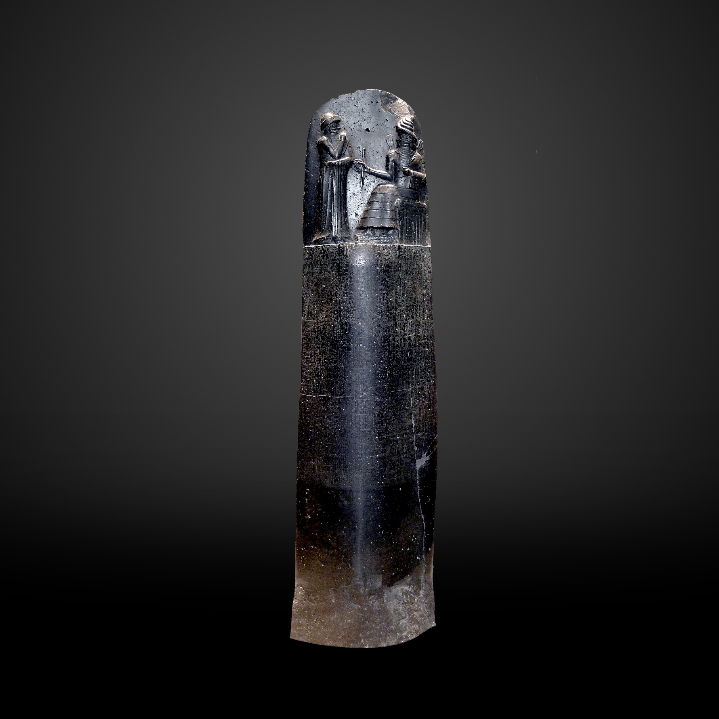 Code de Hammurabi, roi de Babylone ; face avant.